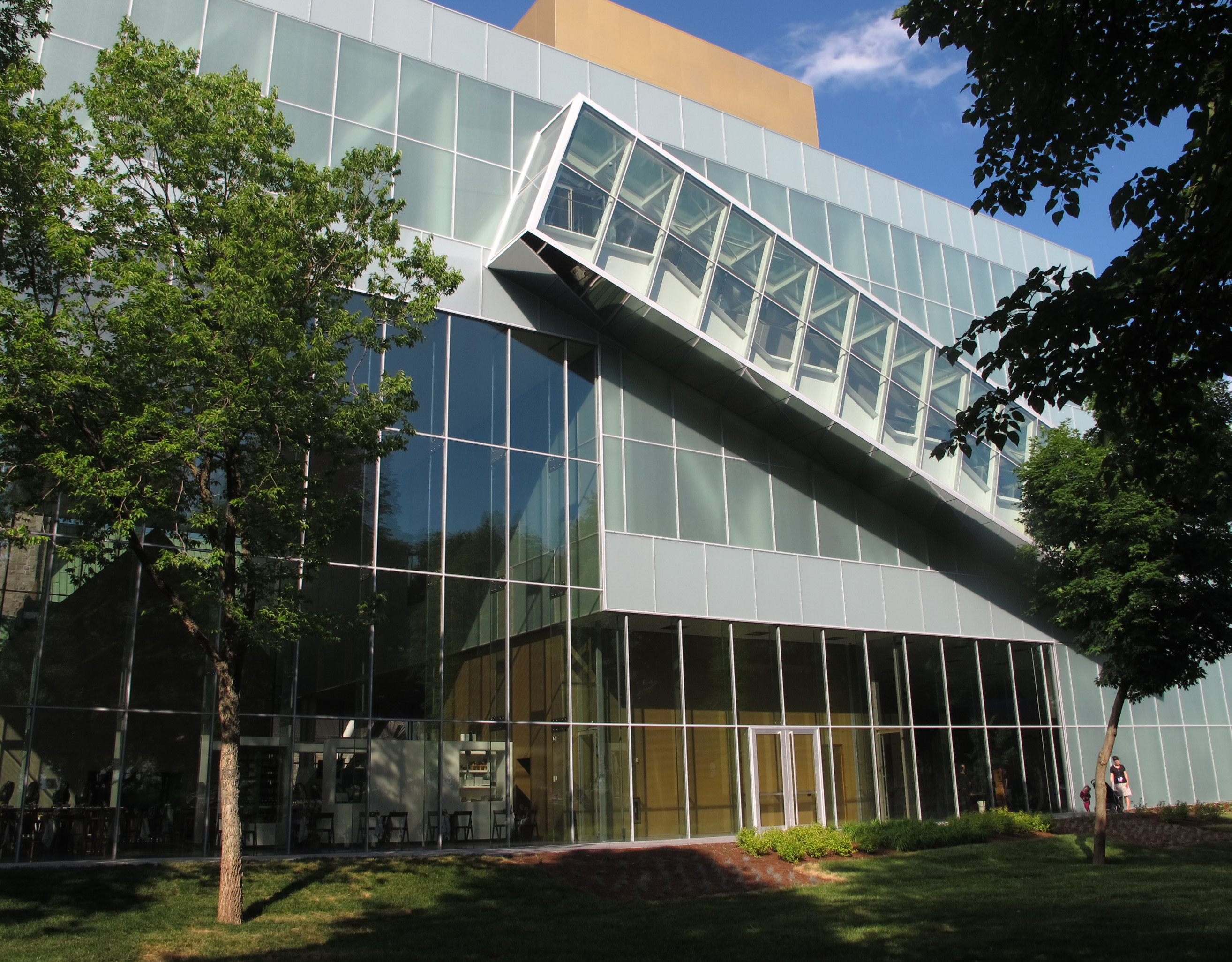 Escalier suspendu Groupe Canam du pavillon Pierre-Lassonde, MNBAQ, Québec